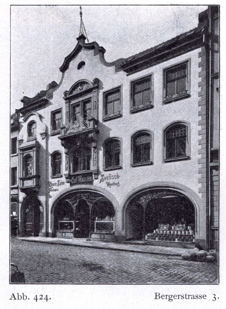 Geschäfshaus Bergerstraße 3 in Düsseldorf, erbaut 1899, Architekt Viktor Wolff, Bauherr Fischhandlung Karl Maaßen.jpg